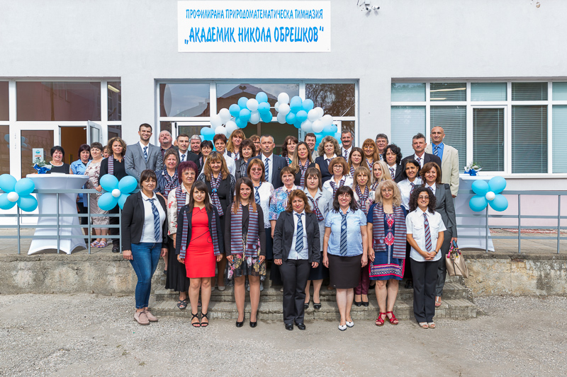 Откриване на учебната 2018/2019 година в новата сграда.